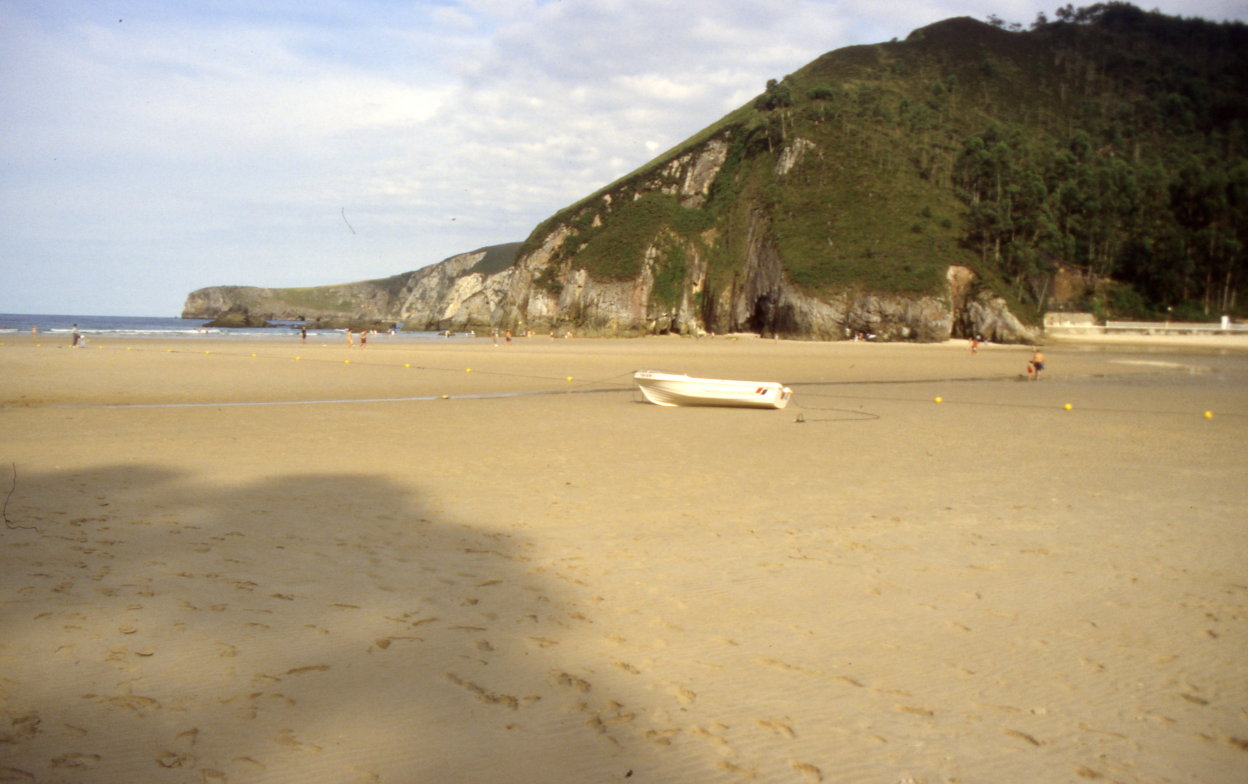 RibadedevaStrand1